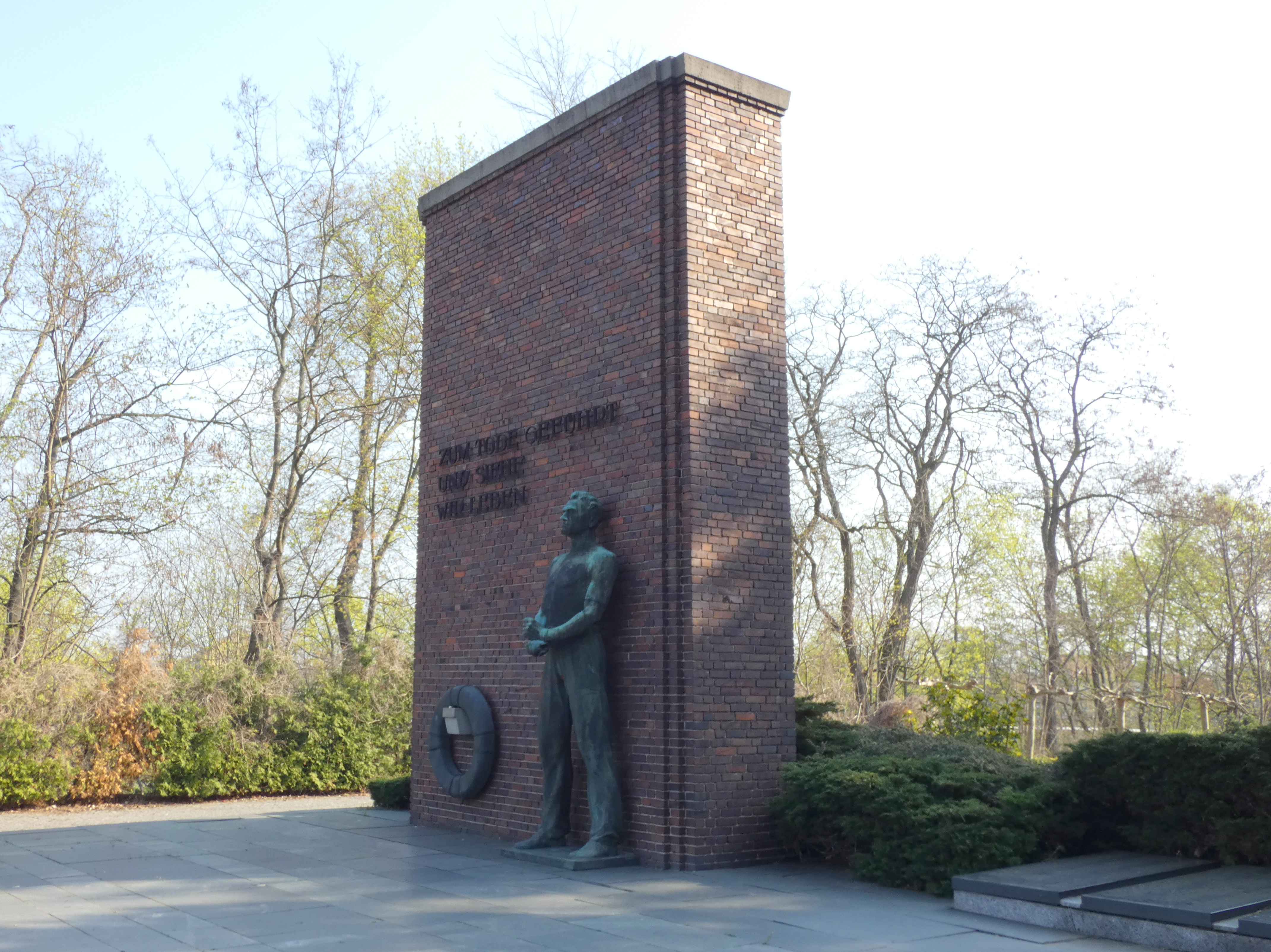 Ehrenmal für die im Zuchthaus Brandenburg-Görden hingerichteten antifaschistischen Widerstandskämpfer, zentrale Plastik von Franz Andreas Threyne, Bronze, Brandenburg an der Havel